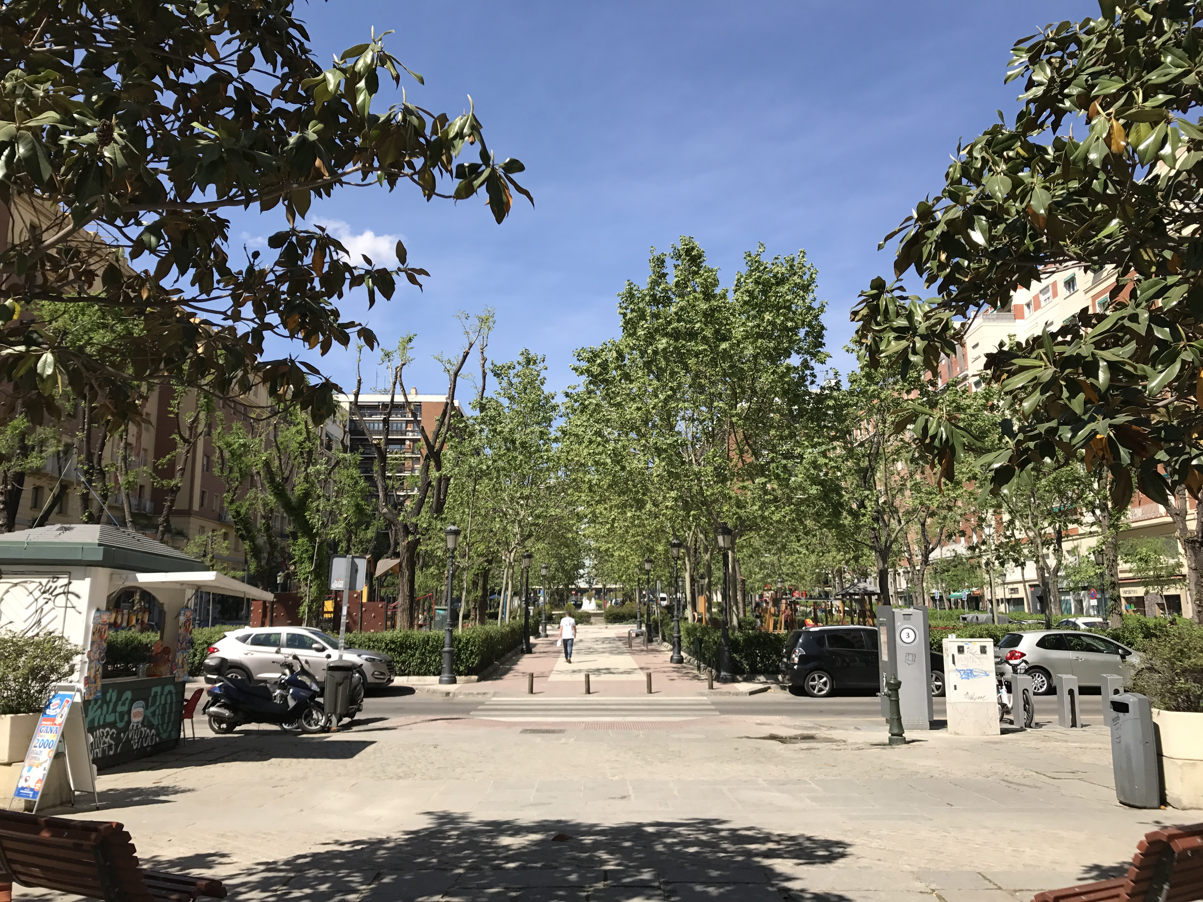 Plaza del Conde del Valle de Suchil, Madrid.